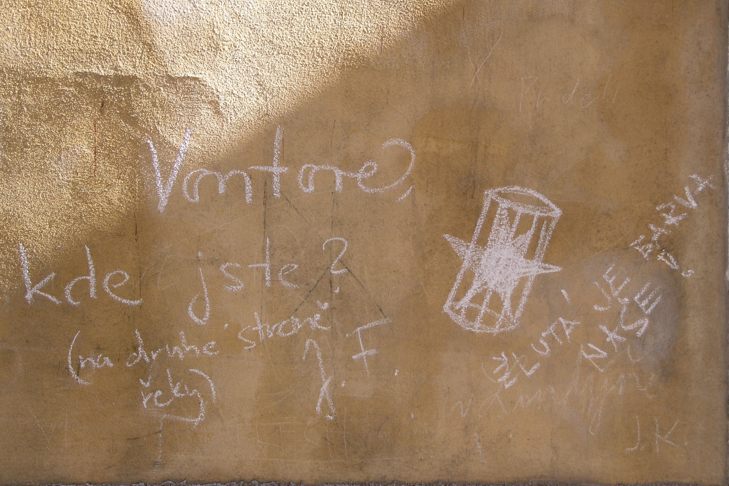 Praha, Malá Strana - nápis na fasádě v Thunovské ulici (Vontové kde jste?)